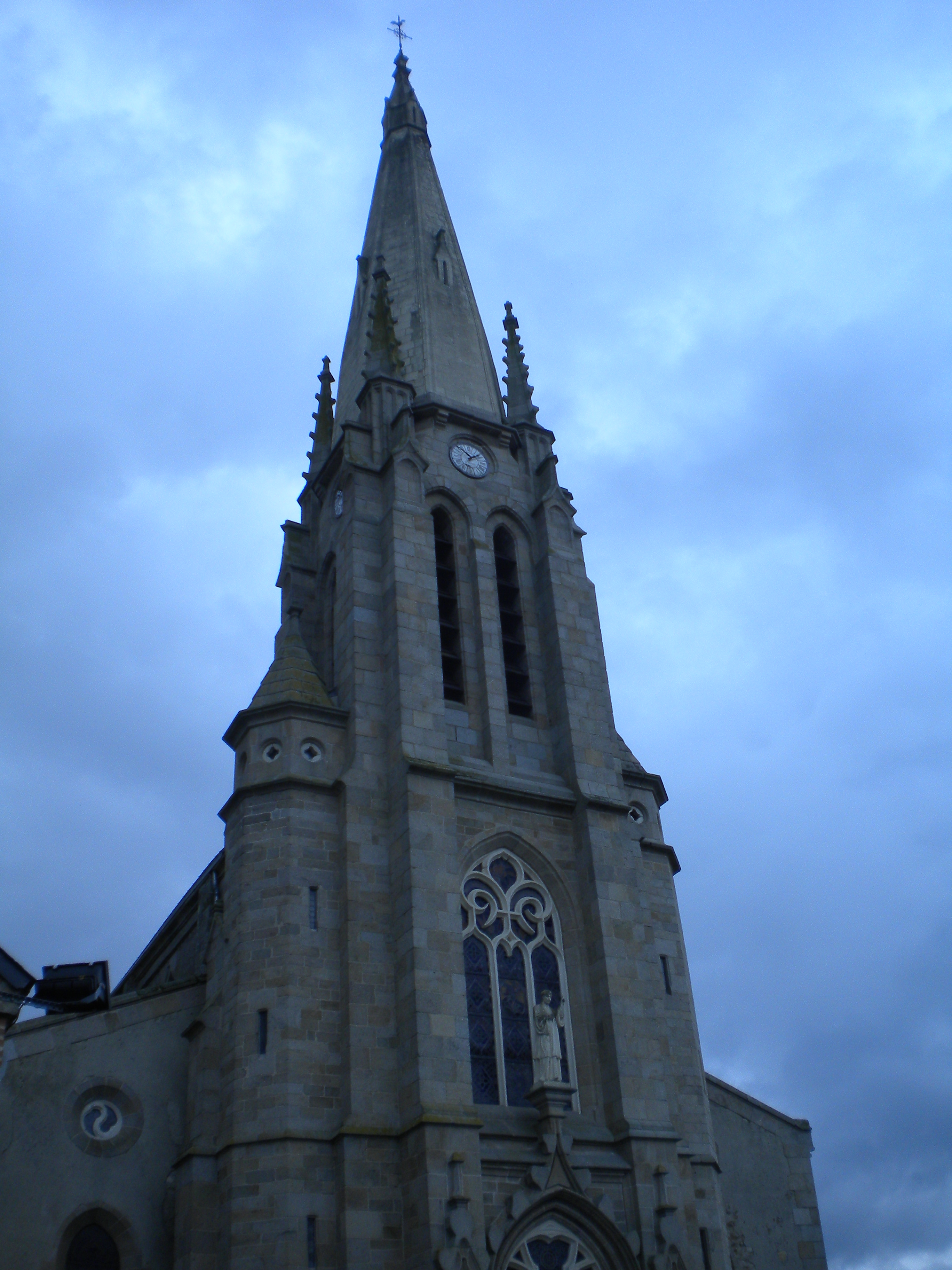 Église Notre-Dame-de-l'Assomption de La Boissière-de-Montaigu.